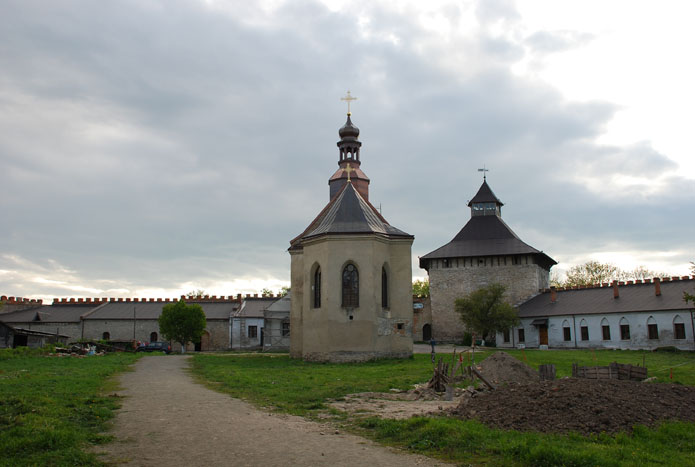 Меджибожский замок